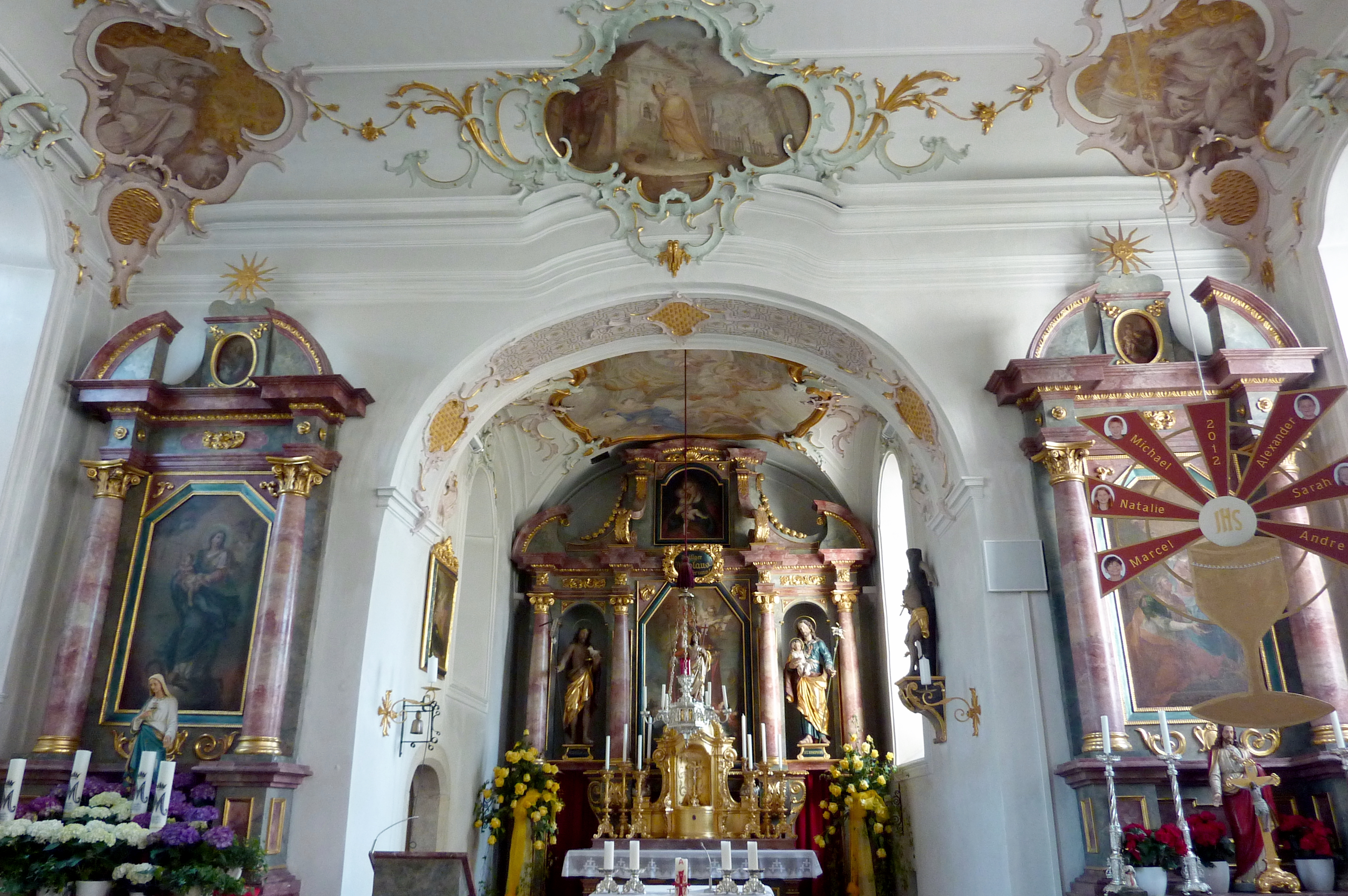 Katholische Pfarrkirche St. Nikolaus in Deisenhofen, einem Stadtteil von Höchstädt an der Donau im Landkreis Dillingen an der Donau (Bayern), Chorturmkirche (15./18. Jahrhundert), Seitenaltäre um 1700 und Chor